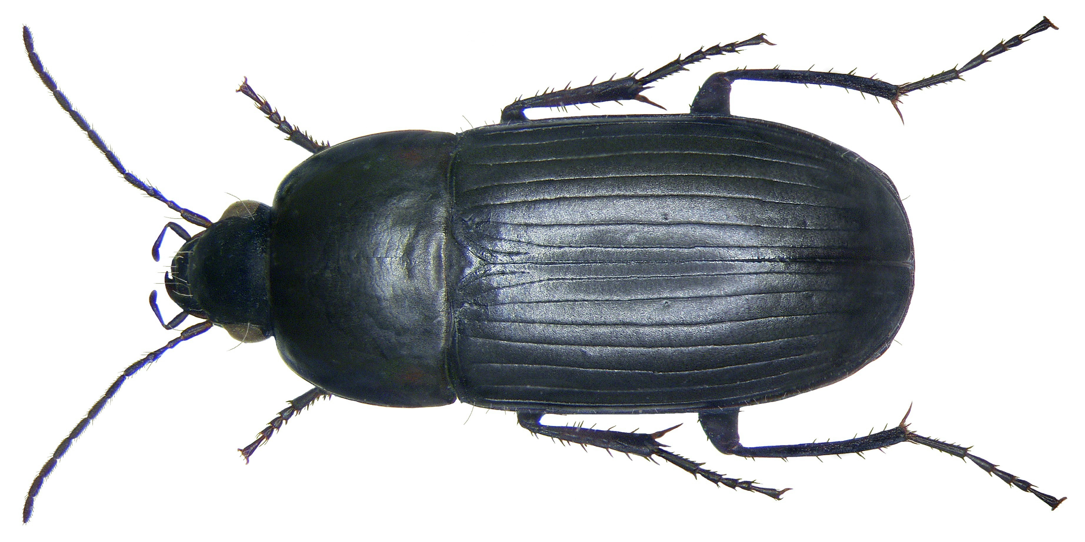 Familie: Carabidae Größe: 7-9,5 mm Verbreitung: Nordafrika, Europa bis Westsibirien Ökologie: bevorzugt sumpfige Biotope Fundort: Austria, Neusiedler See leg.det. R.Budberg, 1959 Foto: U.Schmidt, 2008